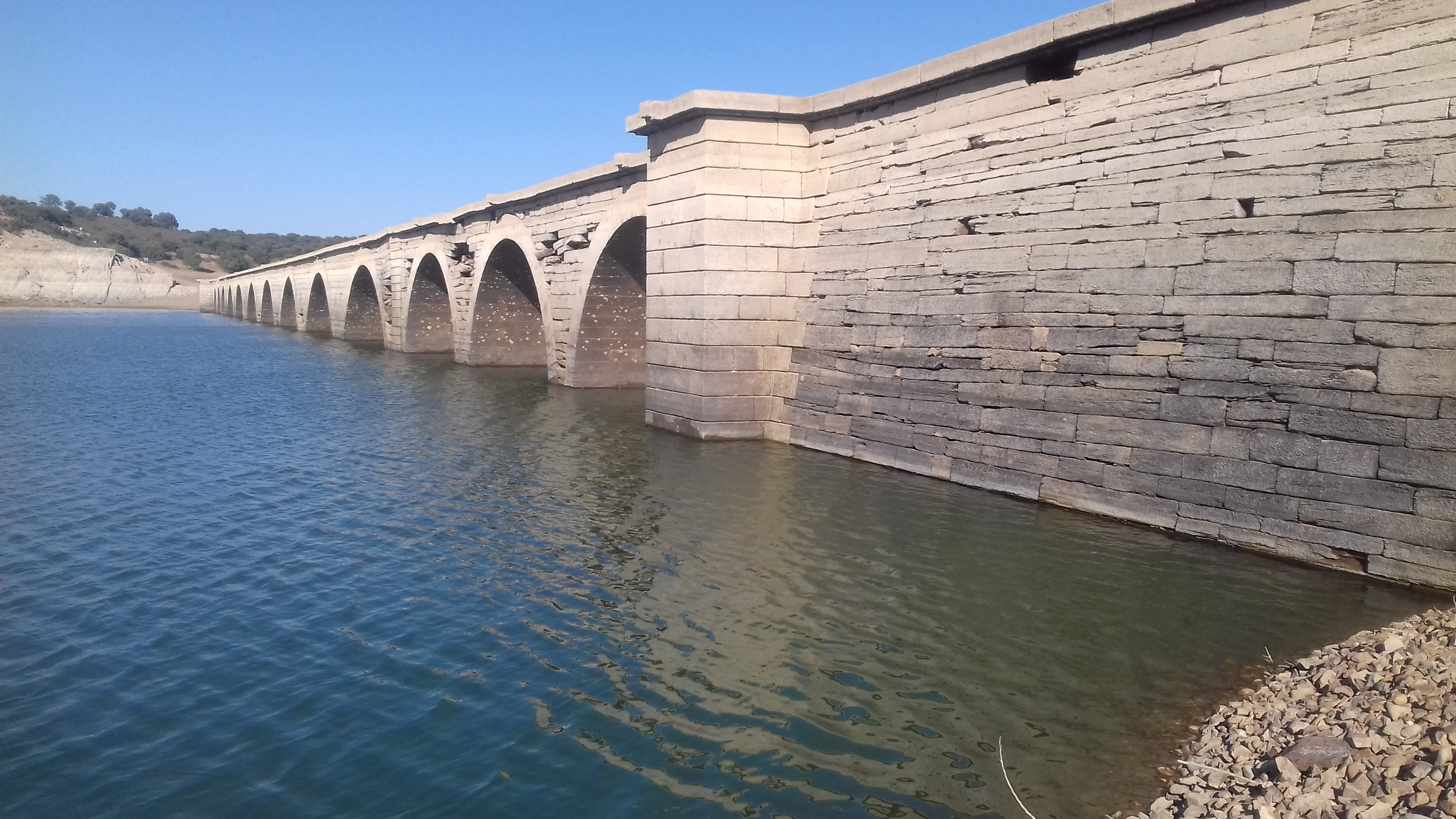 Ponte de La Encomienda, sobre o río Esla, no encoro de Ricobayo